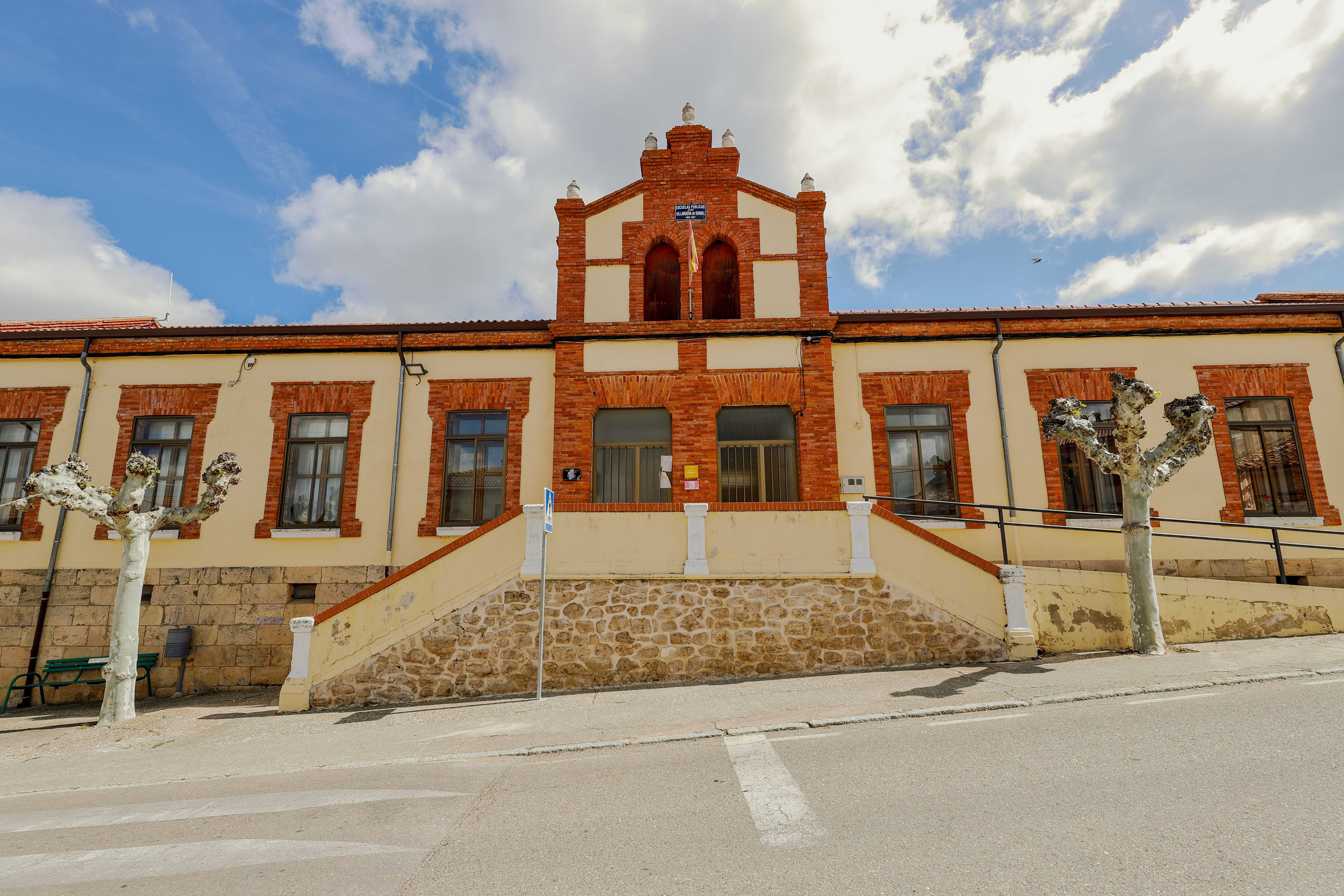 Villanueva de Gumiel es un municipio de la comarca Ribera del Duero, provincia de Burgos.